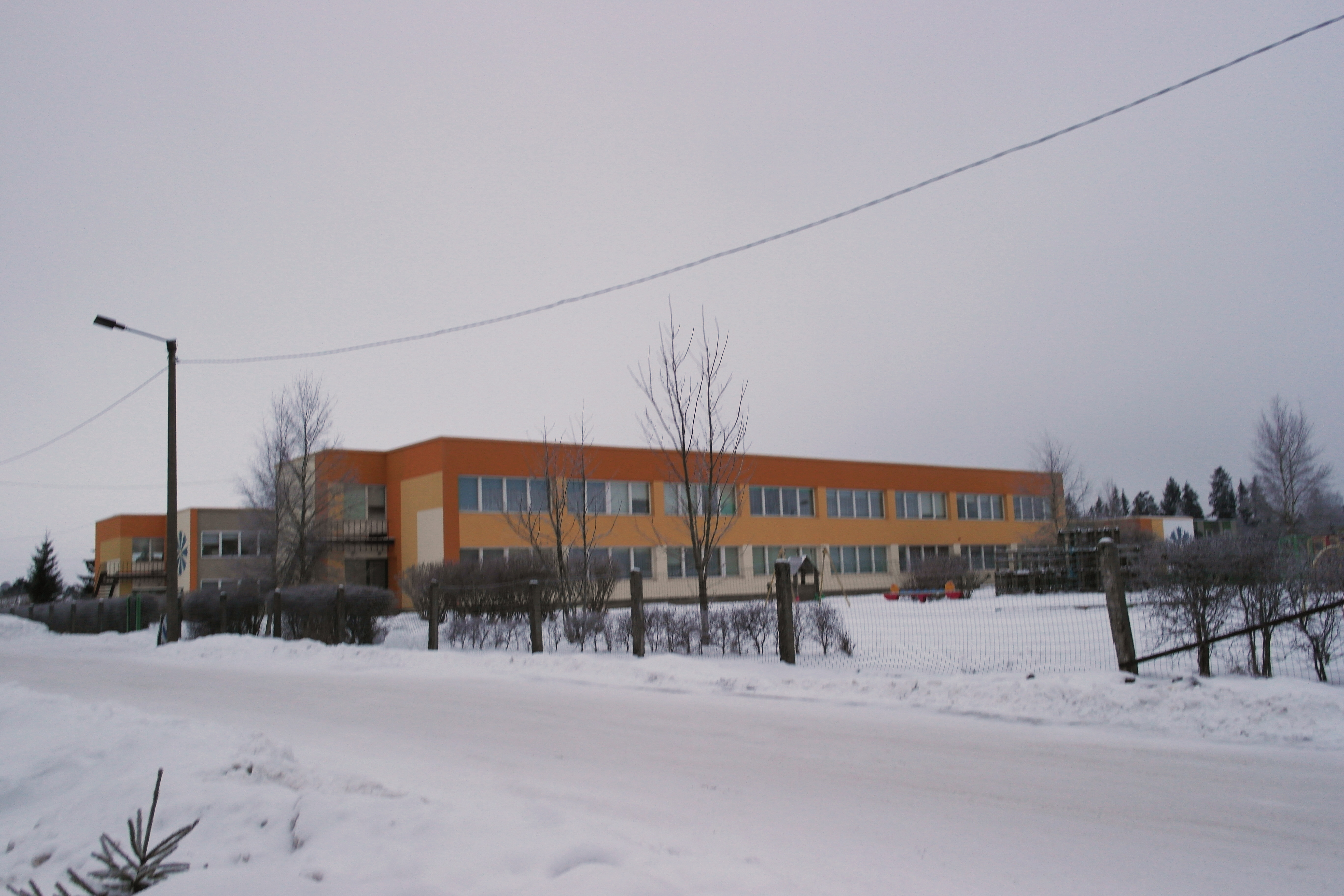 Aruküla Lasteaed Rukkilill